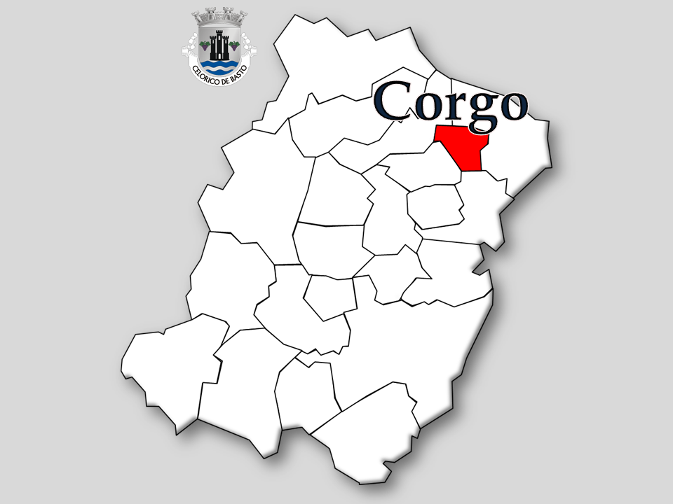 Censos 1864/2011